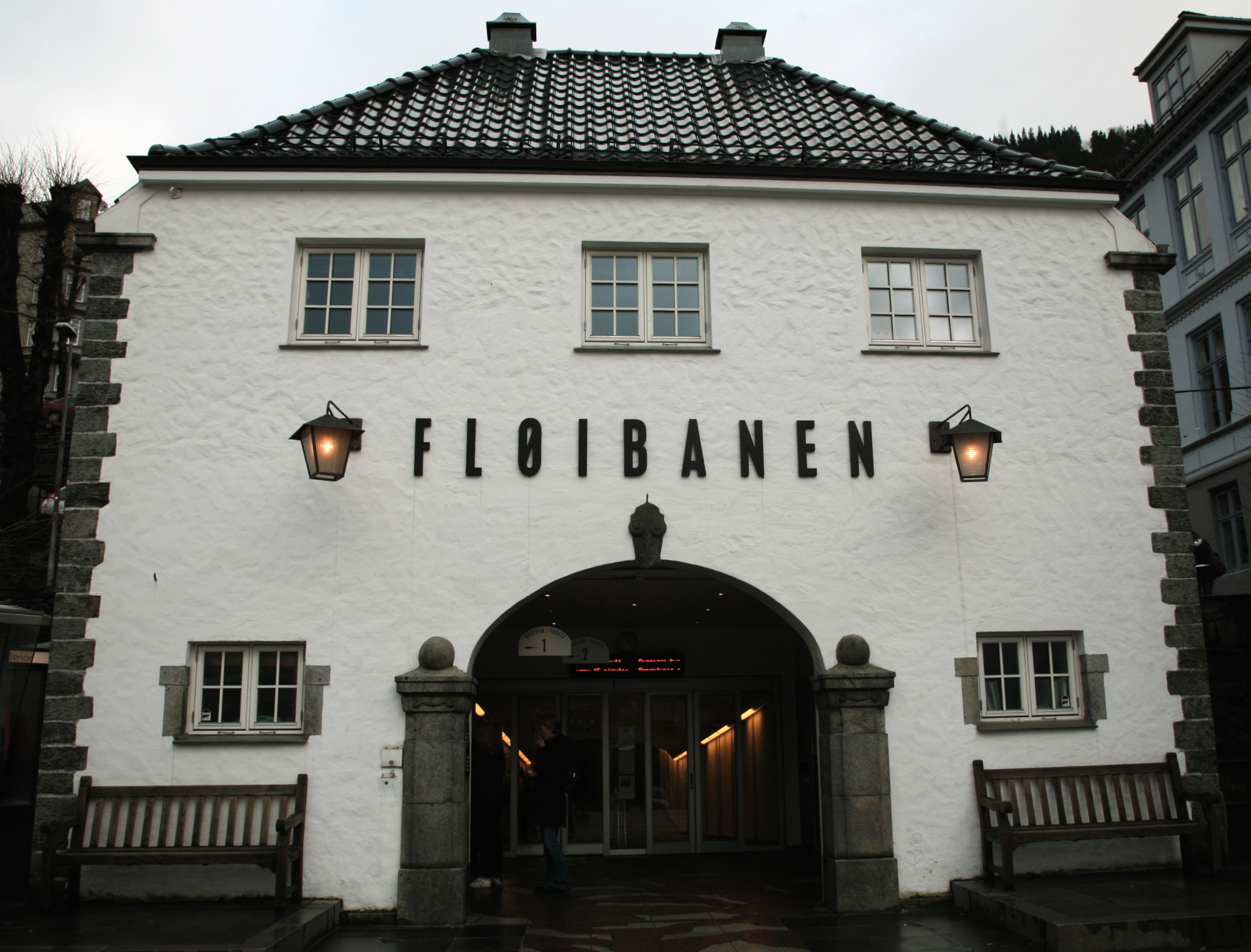 Fløibanestasjonen i Bergen